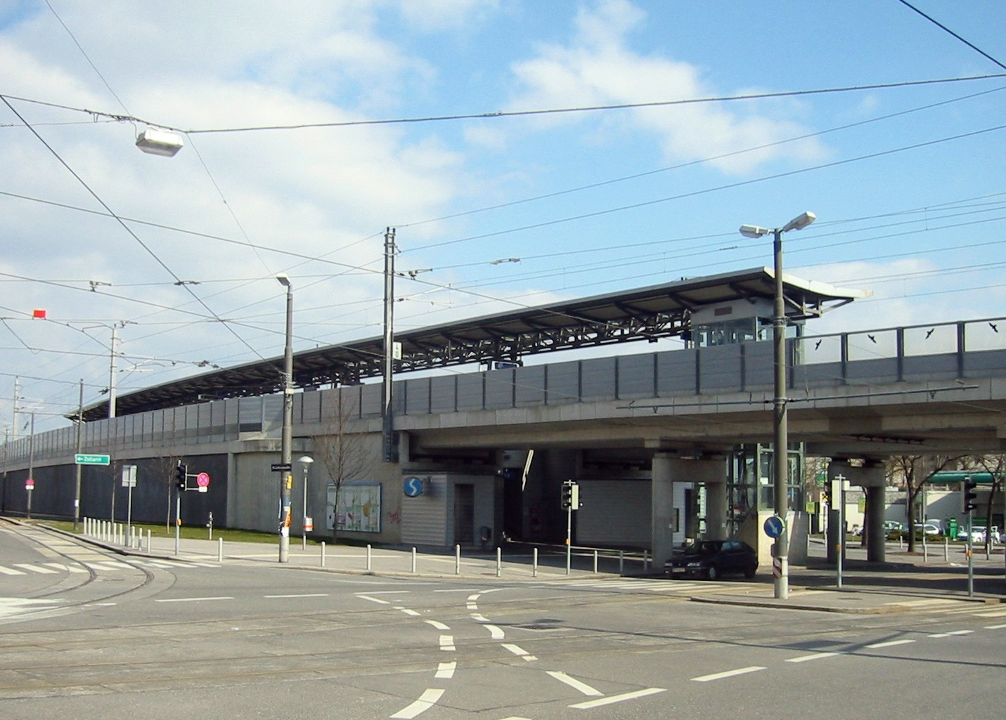 Wien, S-Bahn-Station Geiselbergstraße